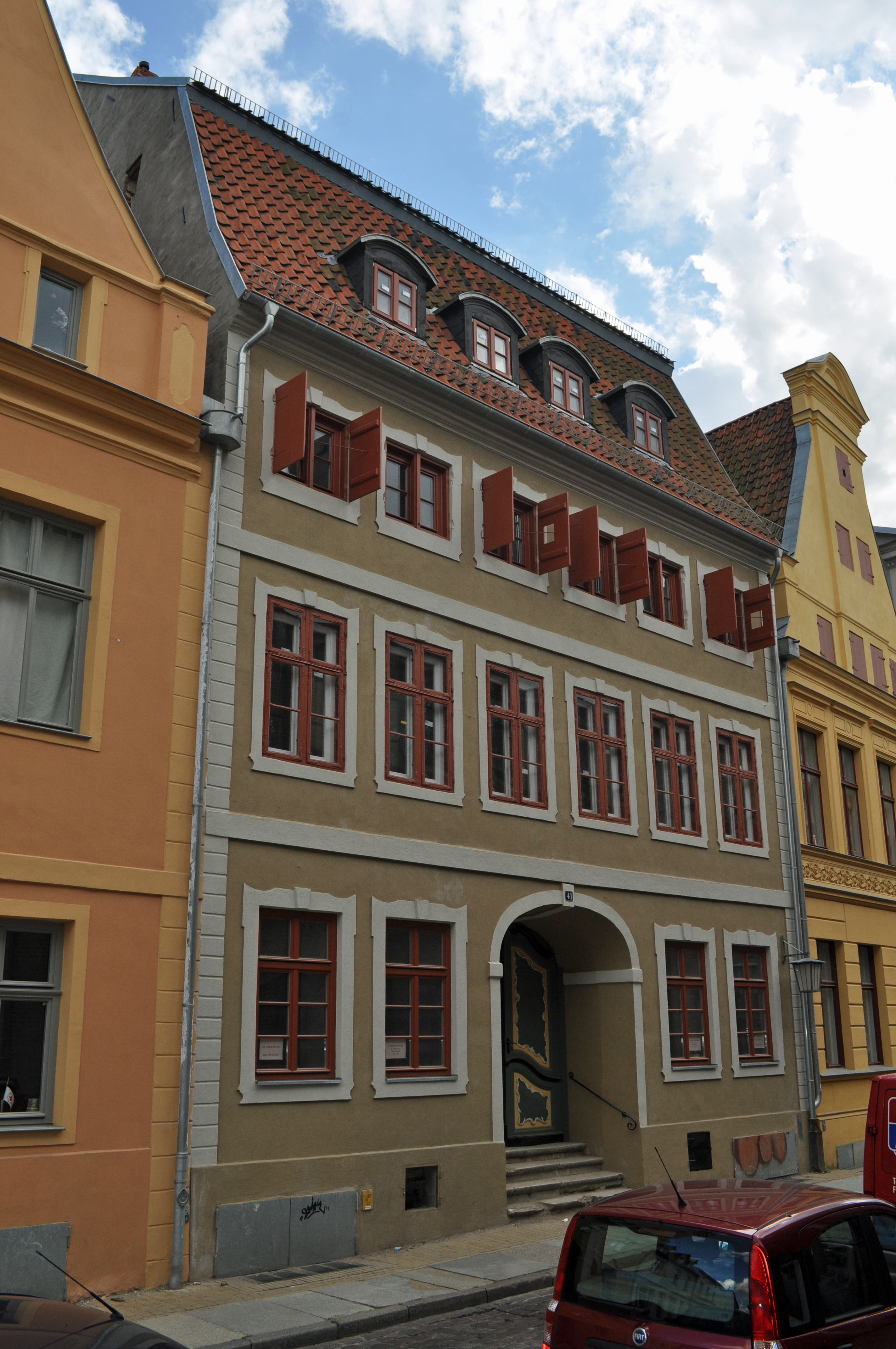 Das Foto zeigt ein Haus (bzw. Details des Hauses) in der Frankenstraße in Stralsund, Deutschland. Die Hausnummer steht im Dateinamen. Aufgenommen am 19. Juli 2011 vom Benutzer:Klugschnacker.